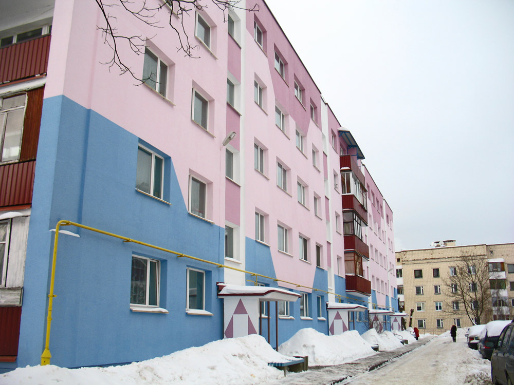 Anharskaja street in Miensk